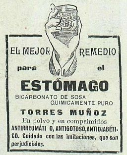 Anuncio del bicarbonato de soda Torres Muñoz, en la revista La Esfera.